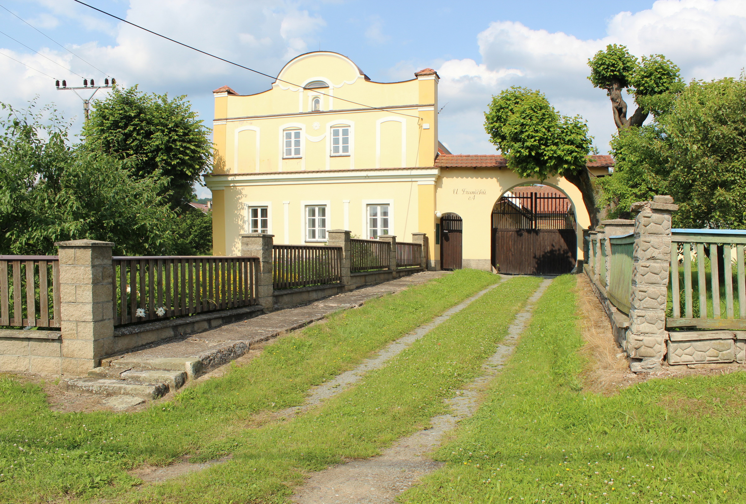 Provodov - Šonov, Šonov u Nového Města nad Metují, dům čp. 3. This photograph was taken with a DSLR from WMCZ's Camera grant.